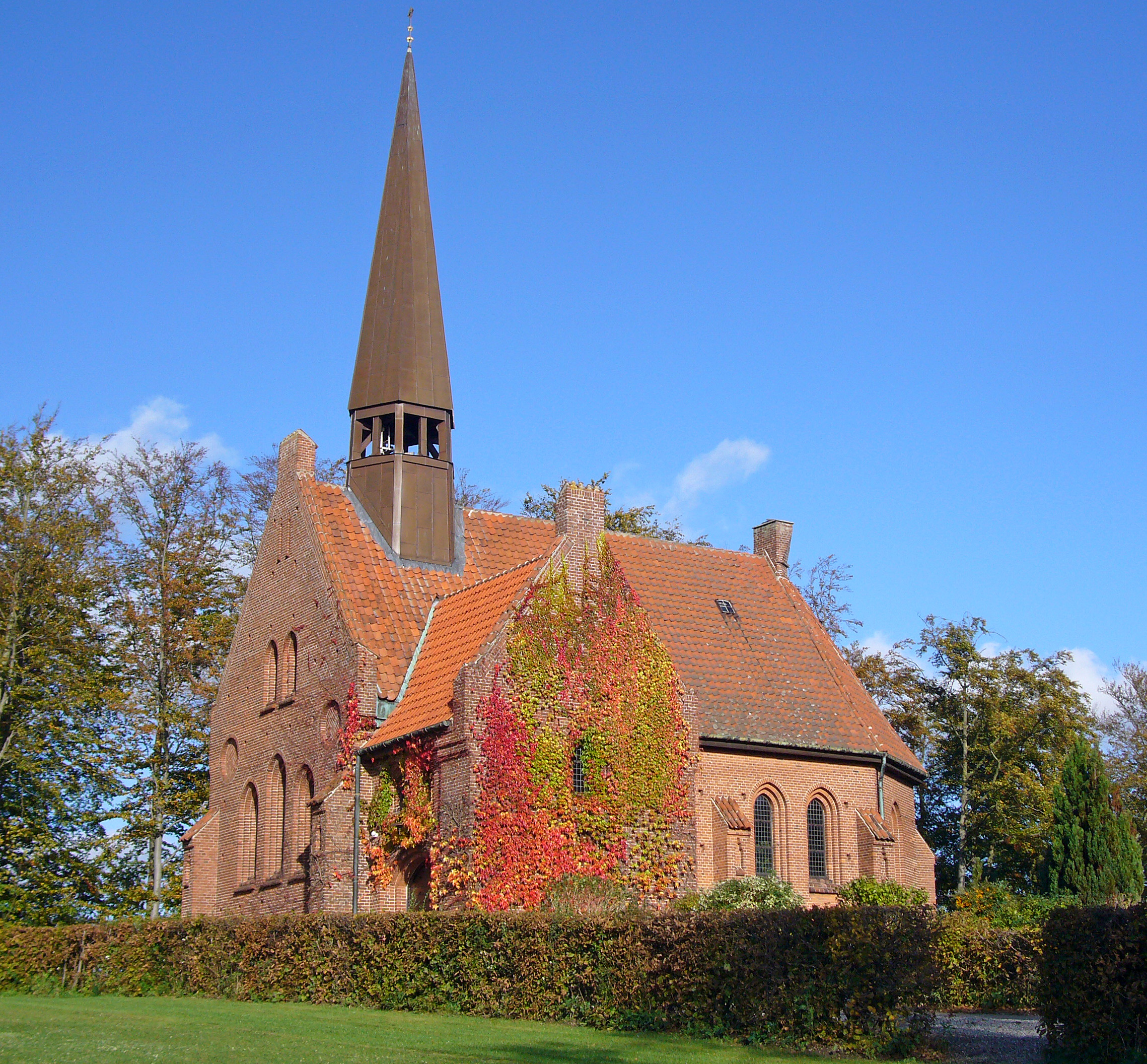 Vor Frue Kirke in Vor Frue, Roskilde, Denmark Exterior